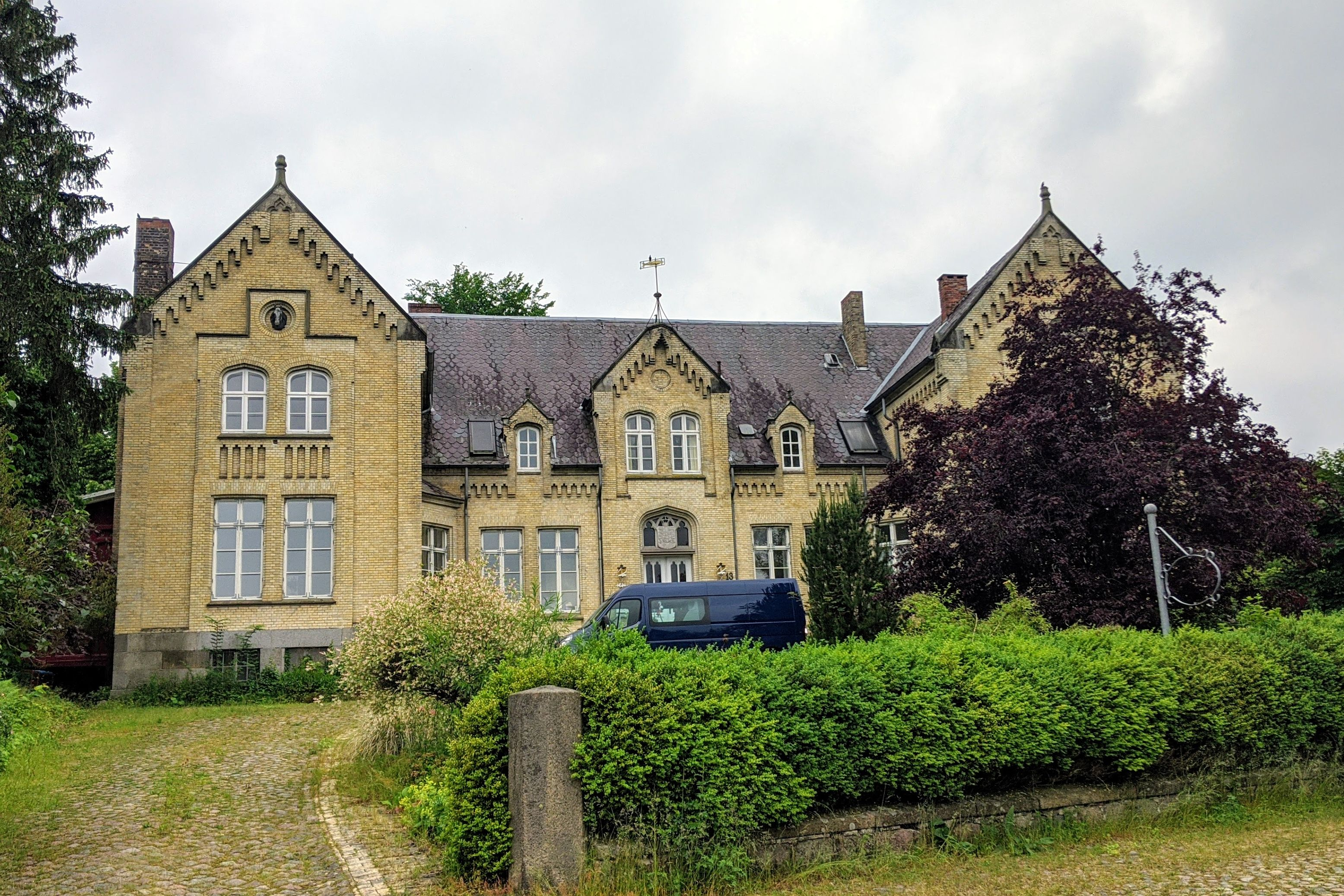 Baudenkmal Wedenberg 13 (altes Landratsamt) in Ratzeburg